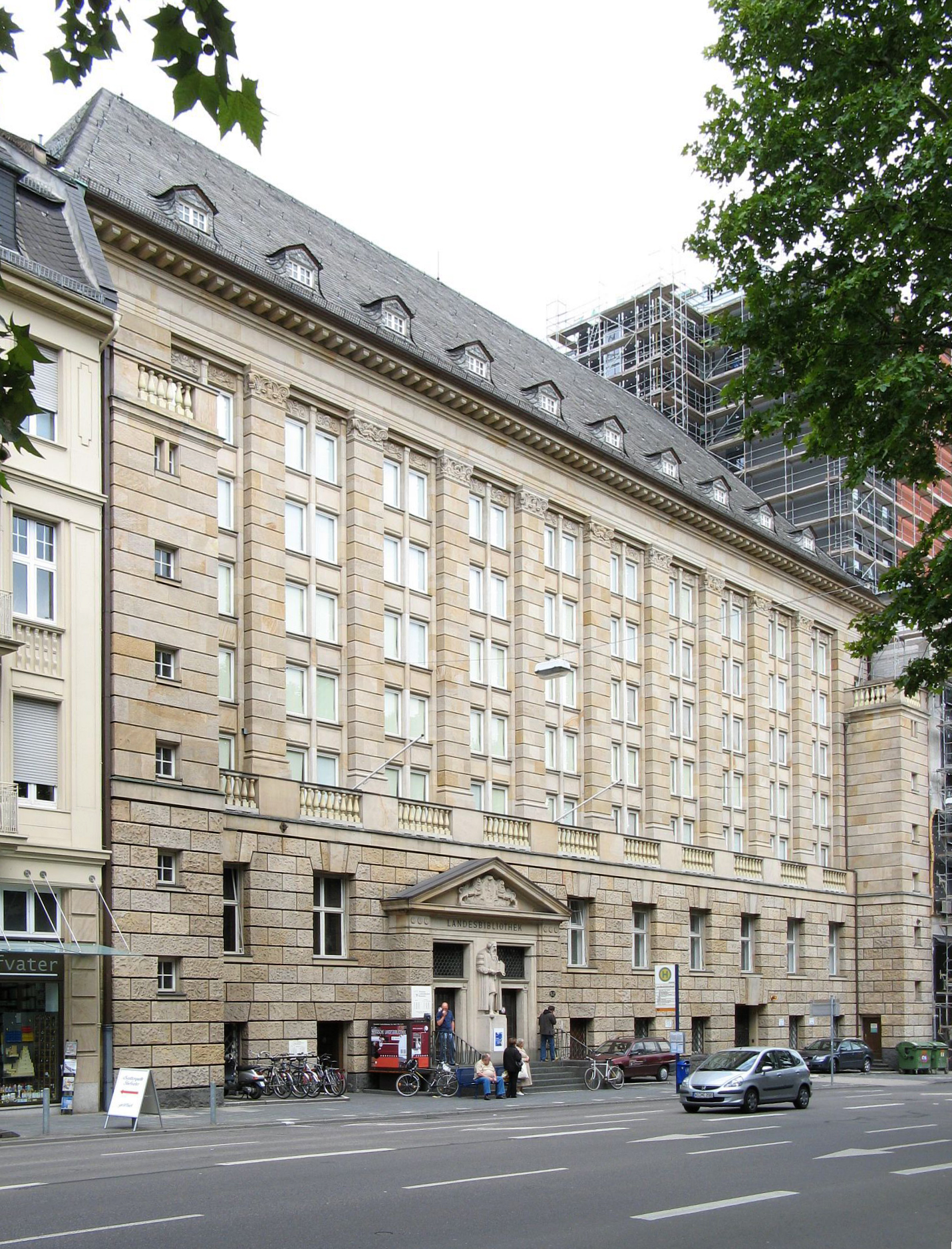 Hessische Landesbibliothek in Wiesbaden